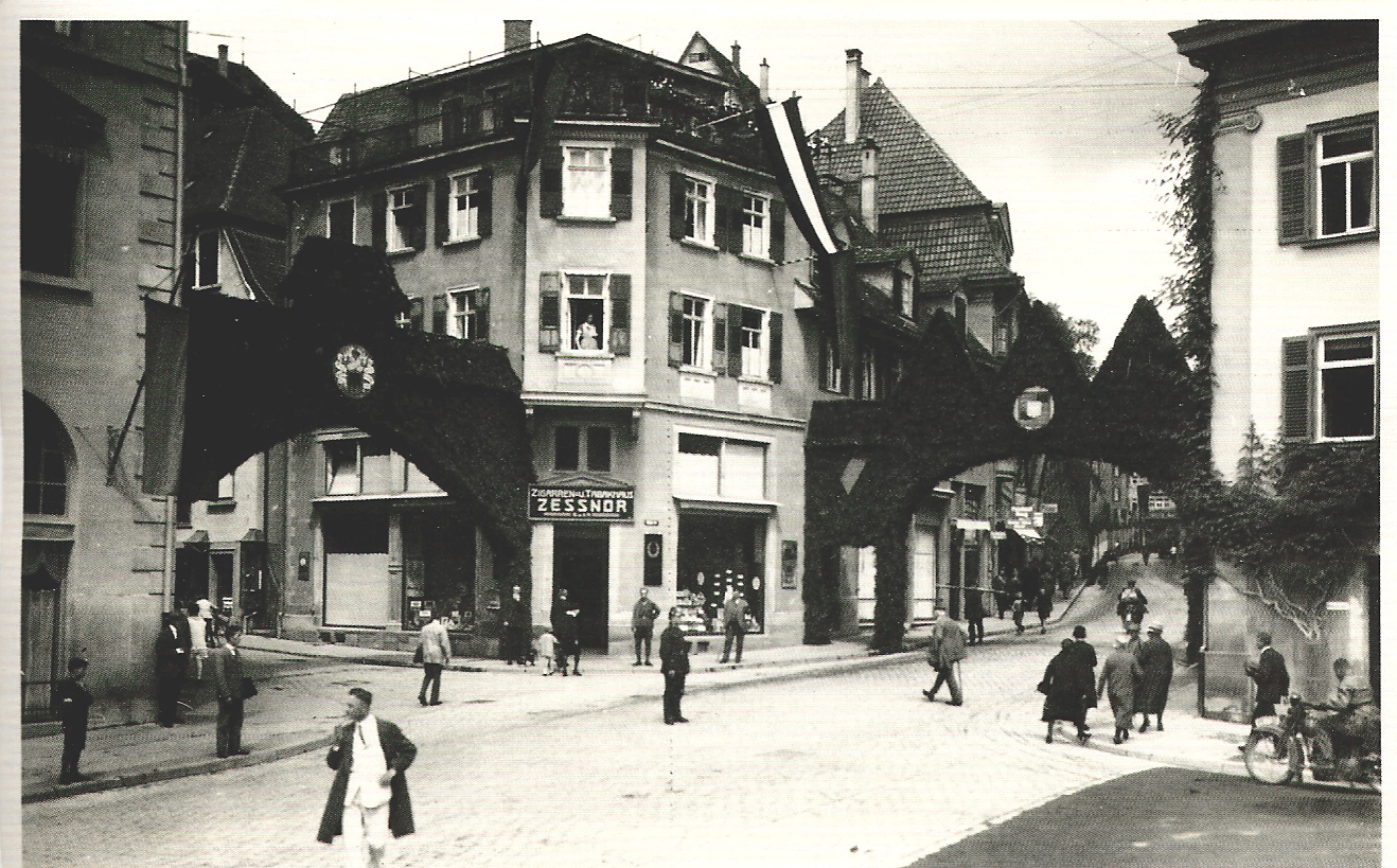 Festlich geschmücktes Tübingen zur 450. Jahrfeier der Universität Tübingen. Neckartor mit Blick in die Mühlstraße. (Fotoansichtskarte)